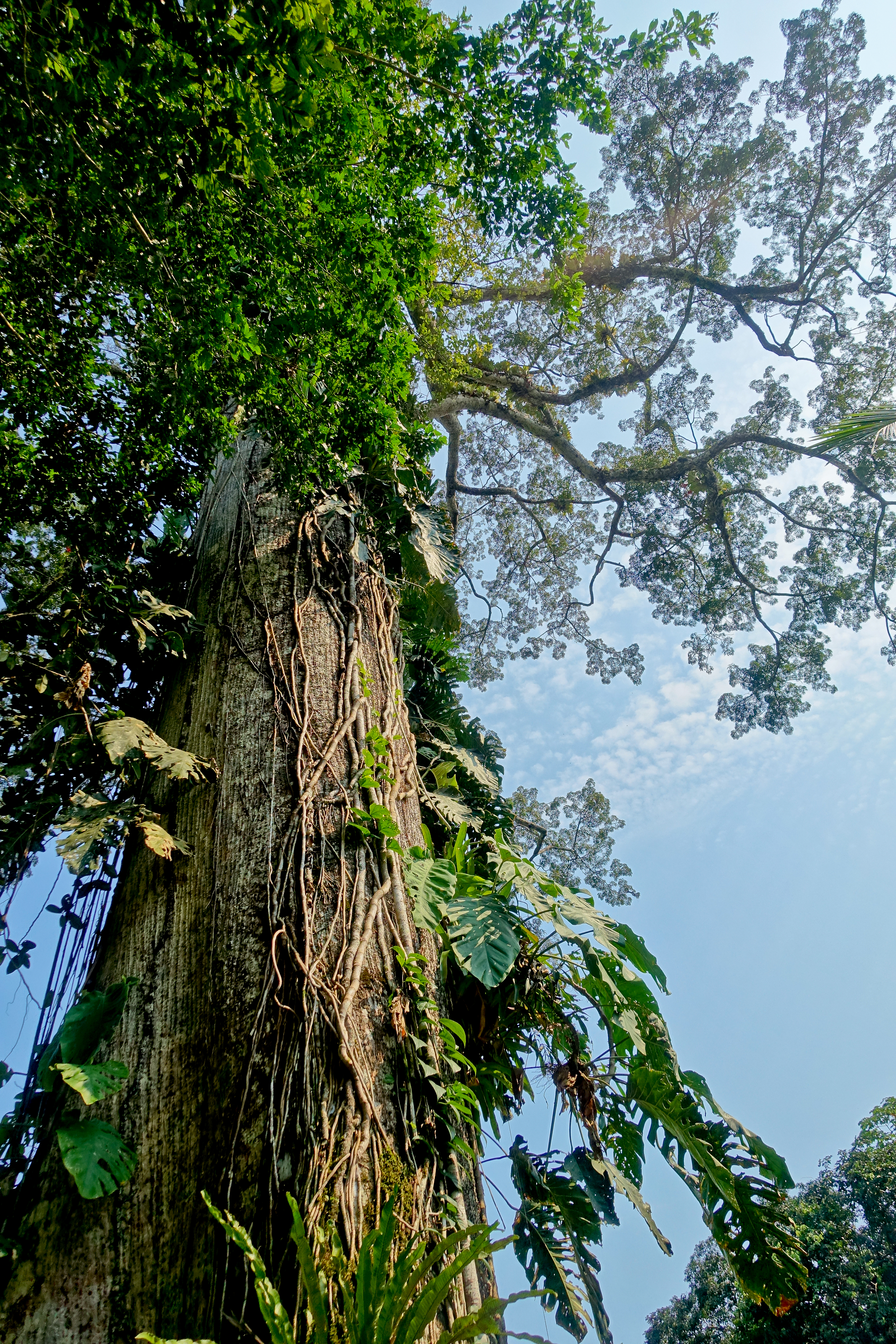 Kapok-Baum, Cuyabeno Reservat, Ecuador